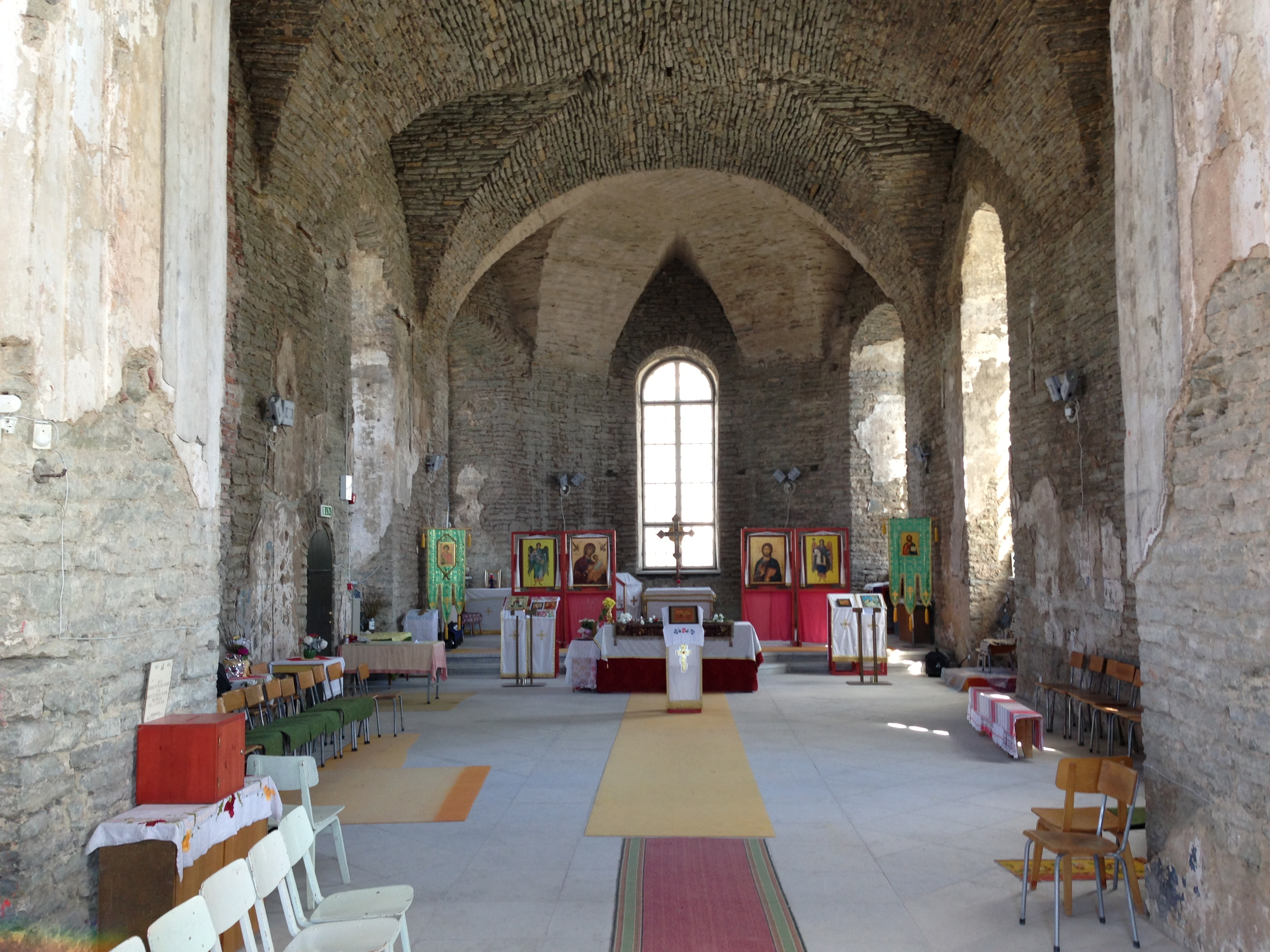 Paldiski Püha Georgi kiriku interjöör